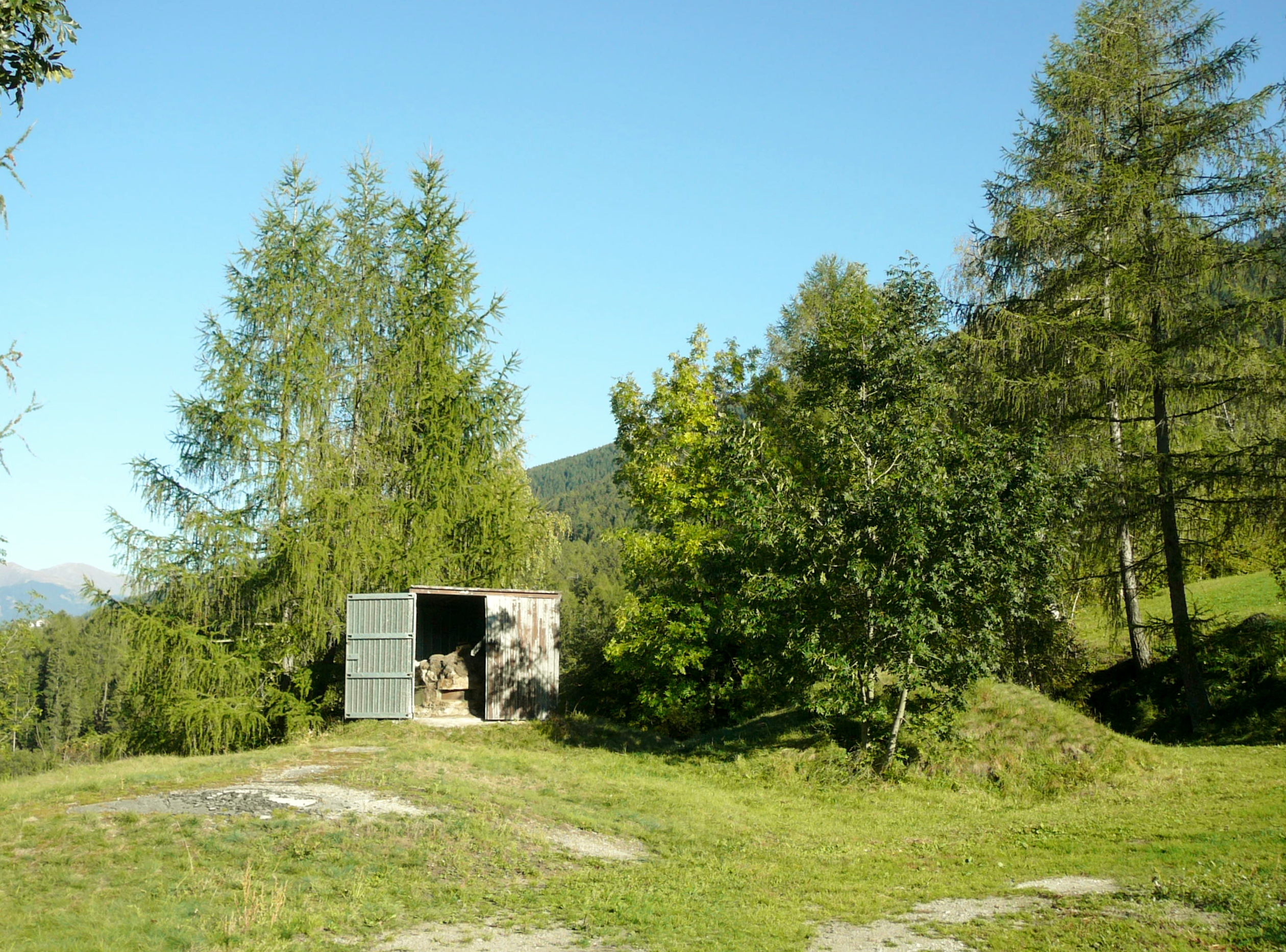 Valdaora opera 13